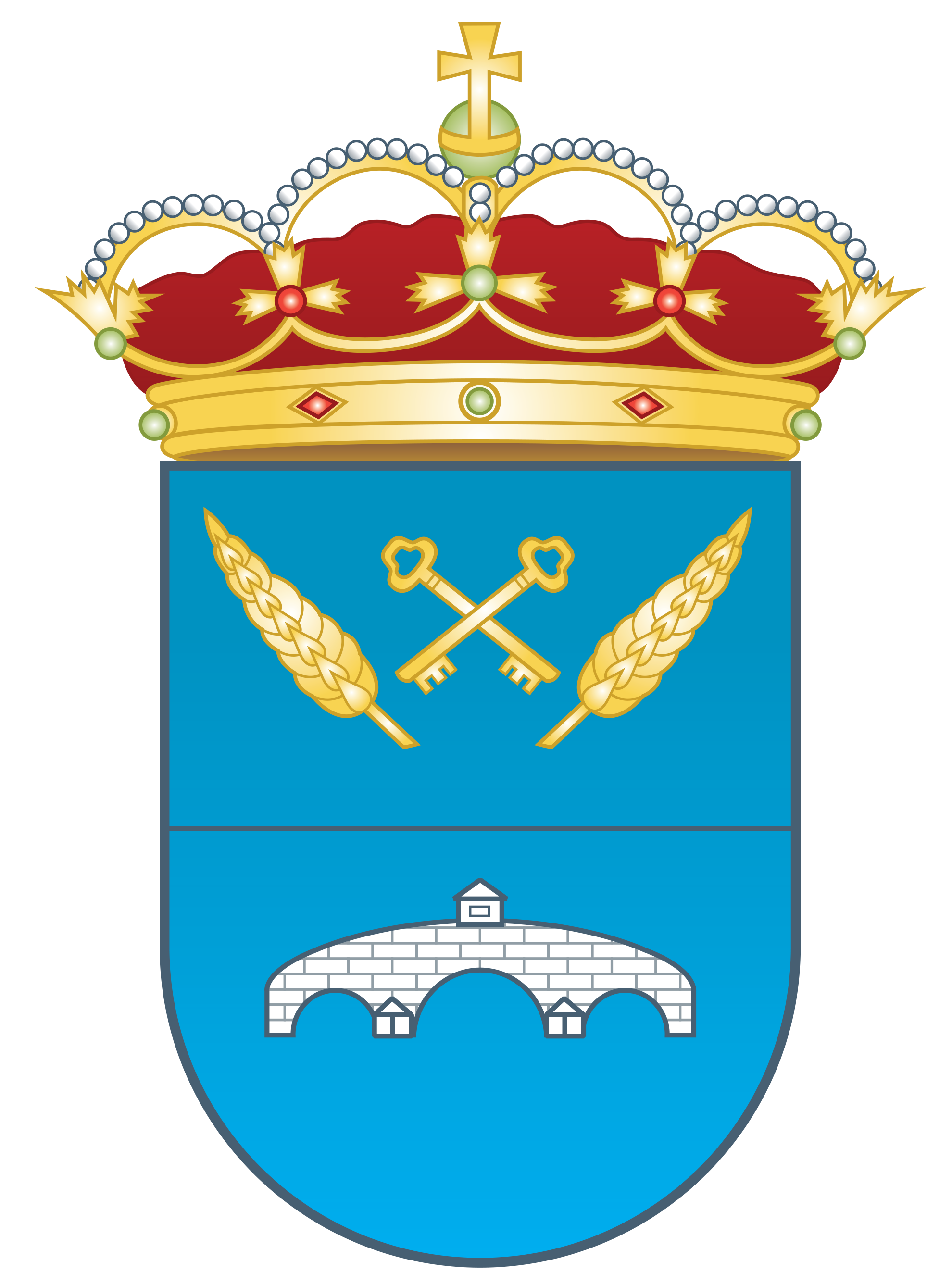 Escudo de Rojales.